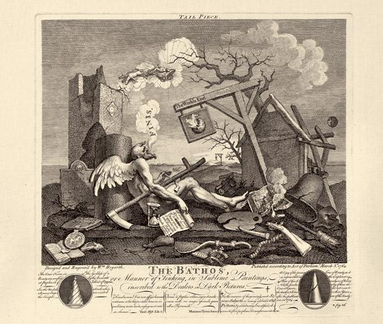 Finis or The Tail Piece von William Hogarth (1764).